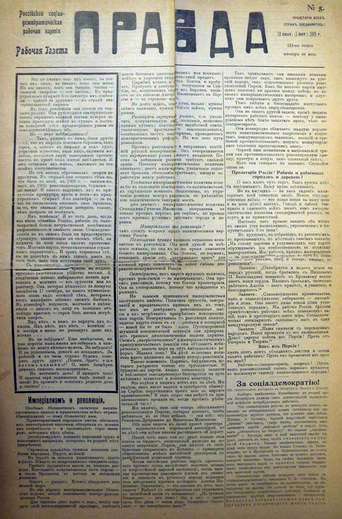 Венская „Правда“ (№5, 1909)